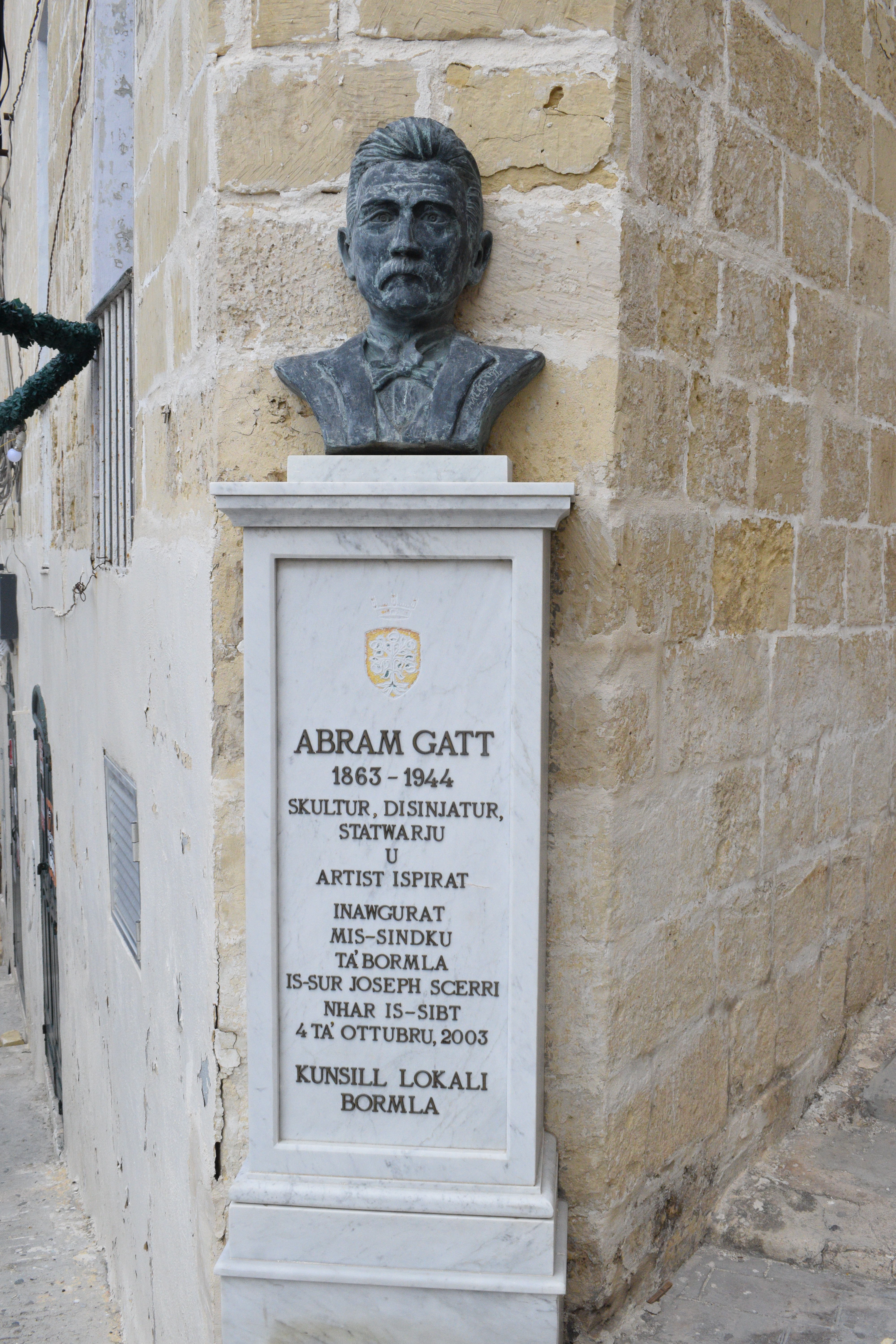 Cospicua. Malti: Bormla.